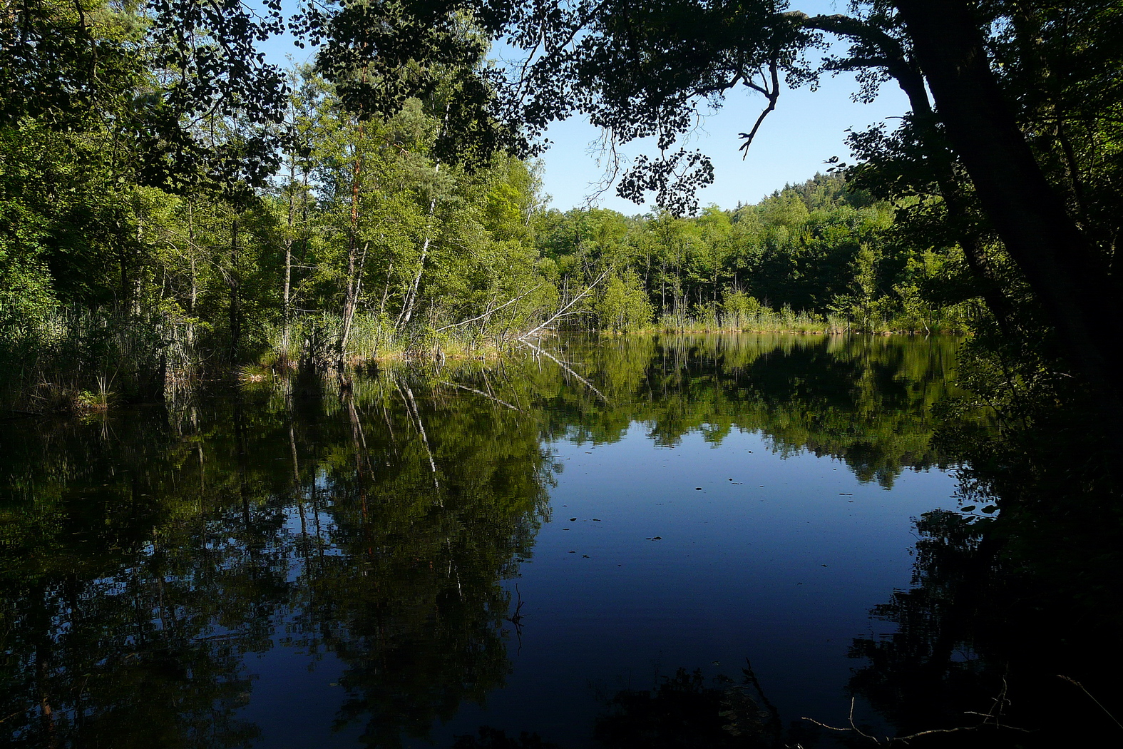 Rybníček v přírodní památce Valcha